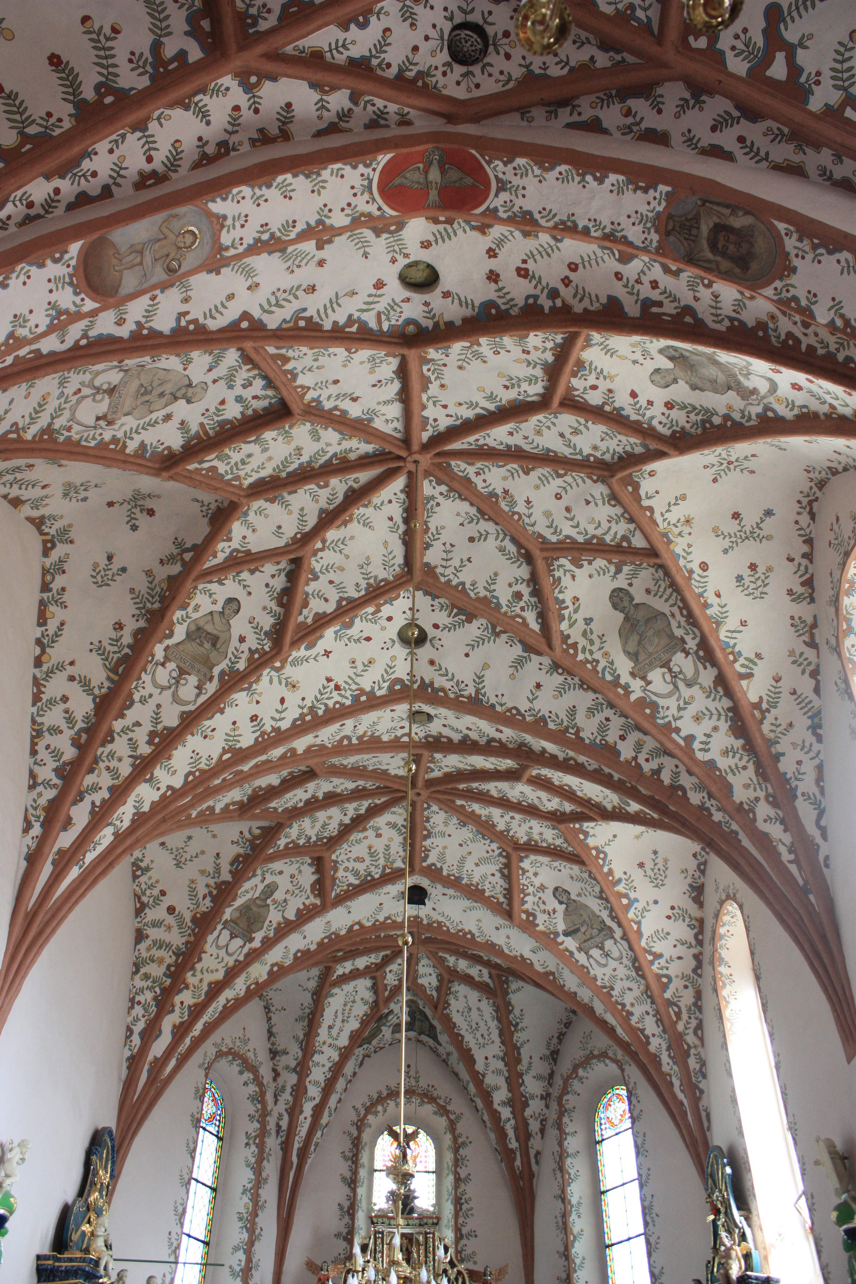 Kościół Narodzenia NMP w Kaźmierzu. Sklepienie.